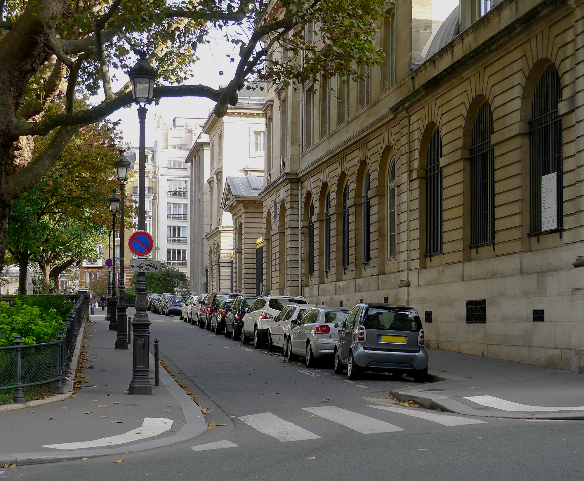 Place Marcelin-Berthelot - Paris V